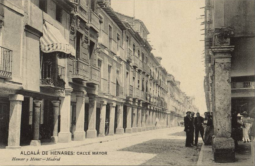 Calle Mayor de Alcalá de Henares (Comunidad de Madrid - España). Tarjeta postal de Hauser y Menet publicada en Madrid hacia 1910, en cartulina blanco y negro de 9 x 14 cm. Texto en el anverso: "ALCALÁ DE HENARES: CALLE MAYOR / Hauser y Menet - Madrid".